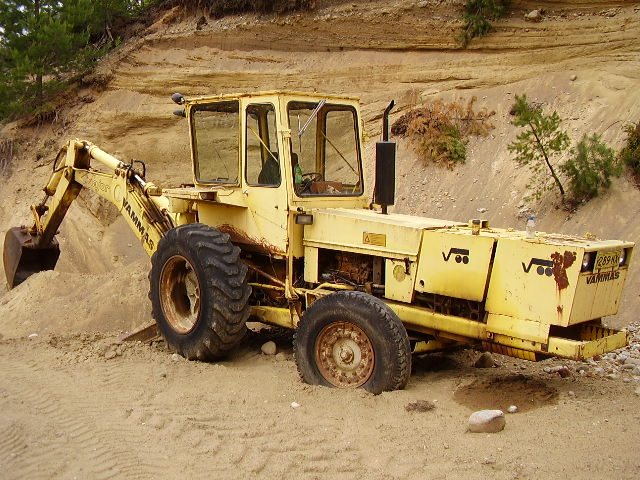 Vammas Major traktorikaivuri